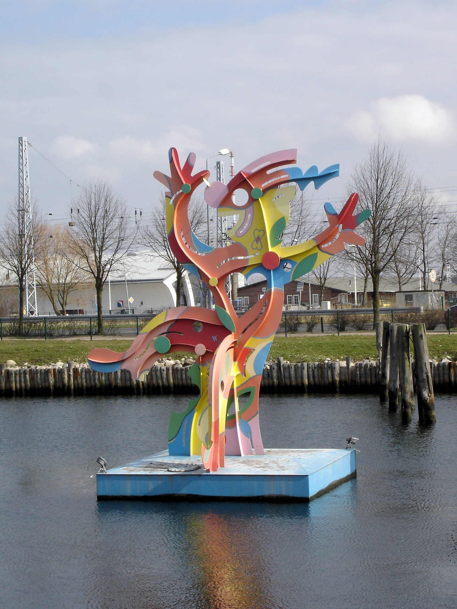 Metallskulptur "Felix" von Feliks Büttner in Rostock - Warnemünde (2002), aktueller Standort auf der Warnow in Schmarl